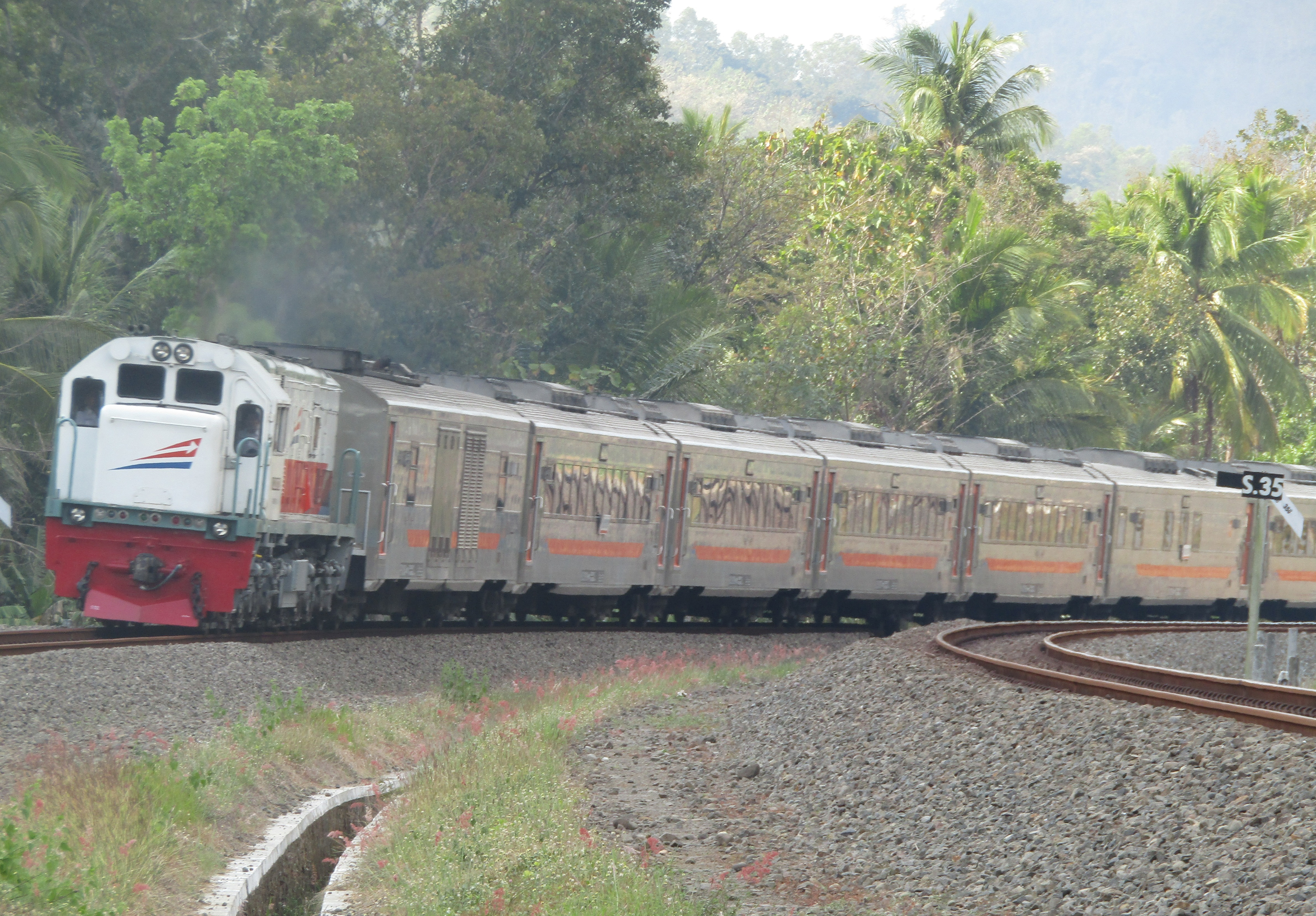 Kereta api Mataram, 2018